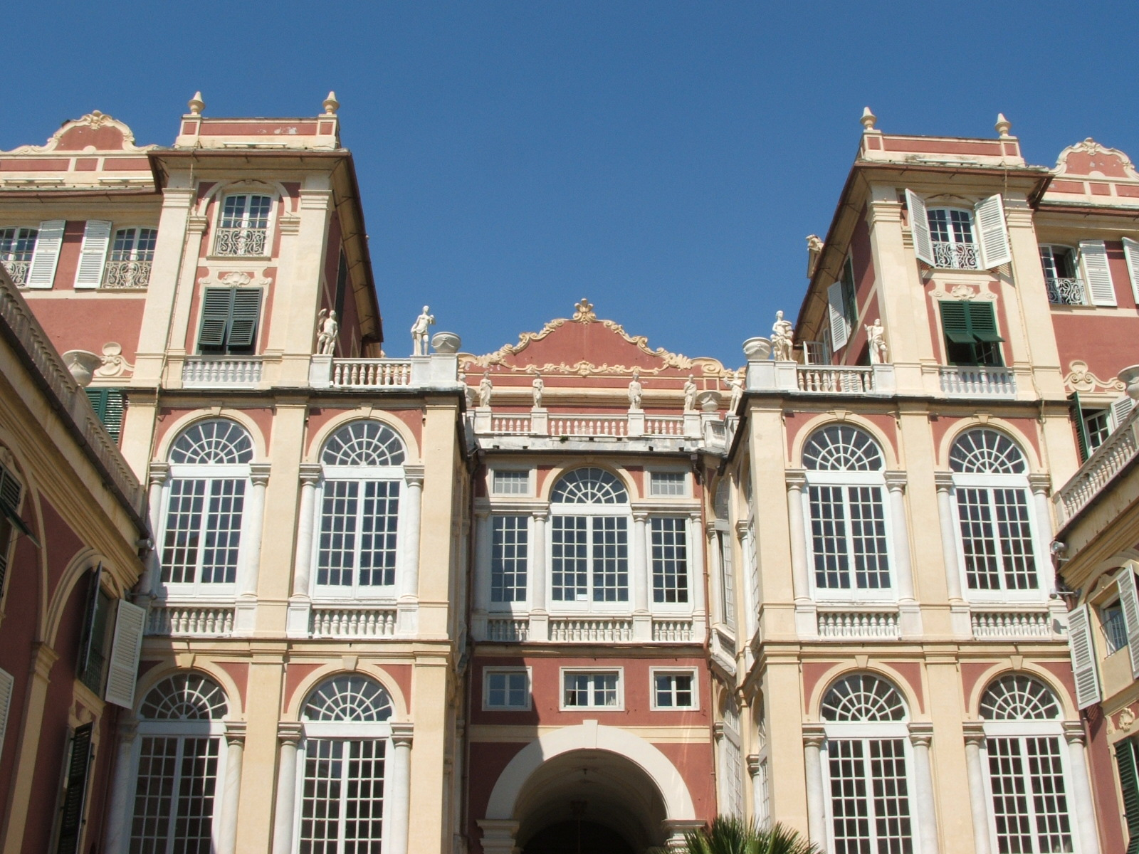 Il cortile di Palazzo Reale di Genova.